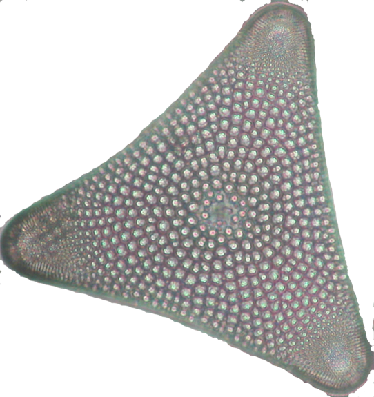 Diatom